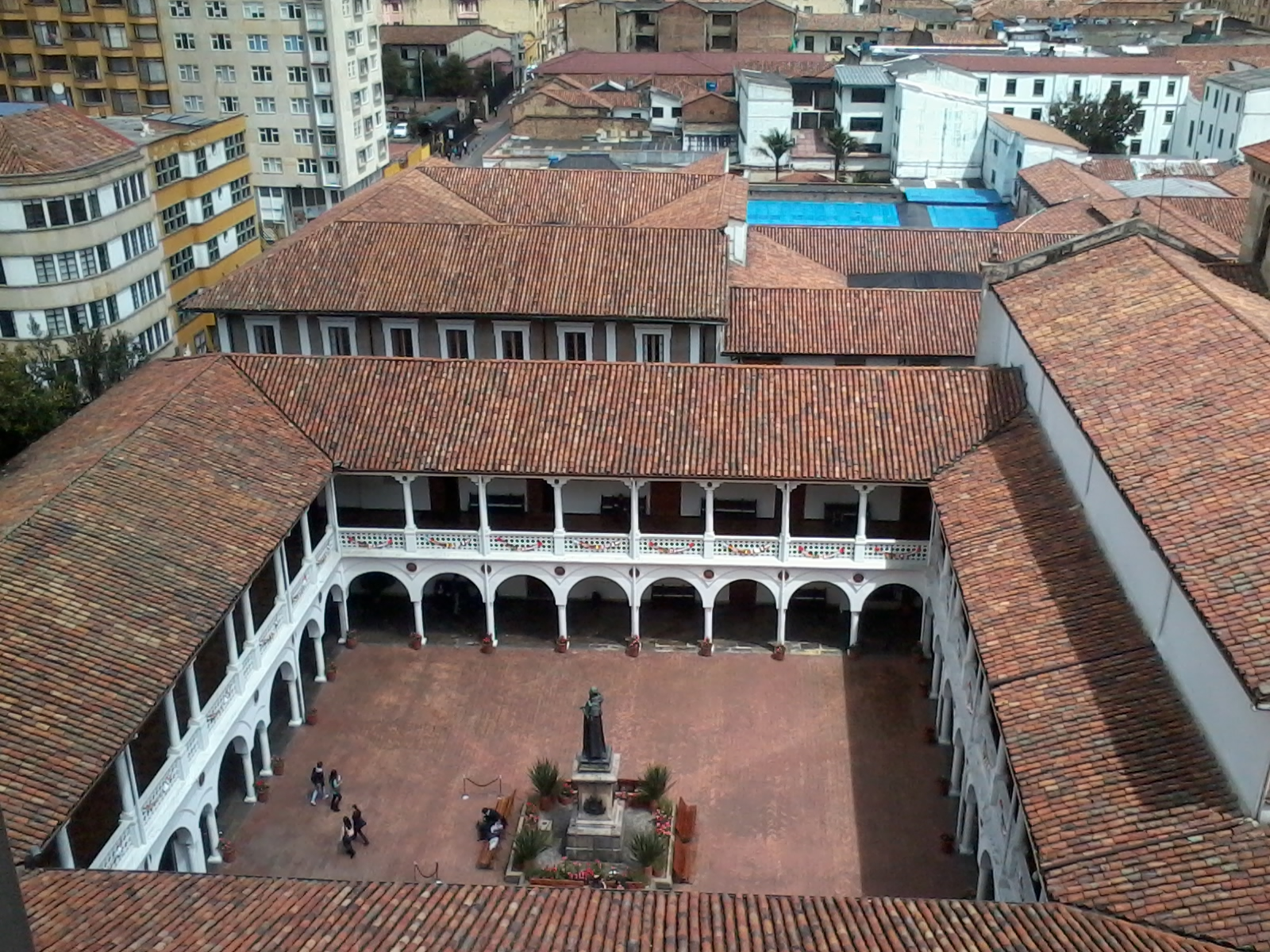 Claustro de la Universidad de Nuestra Señora del Rosario y estatua de Fray Cristobal de Torres, Fundador de la universidad